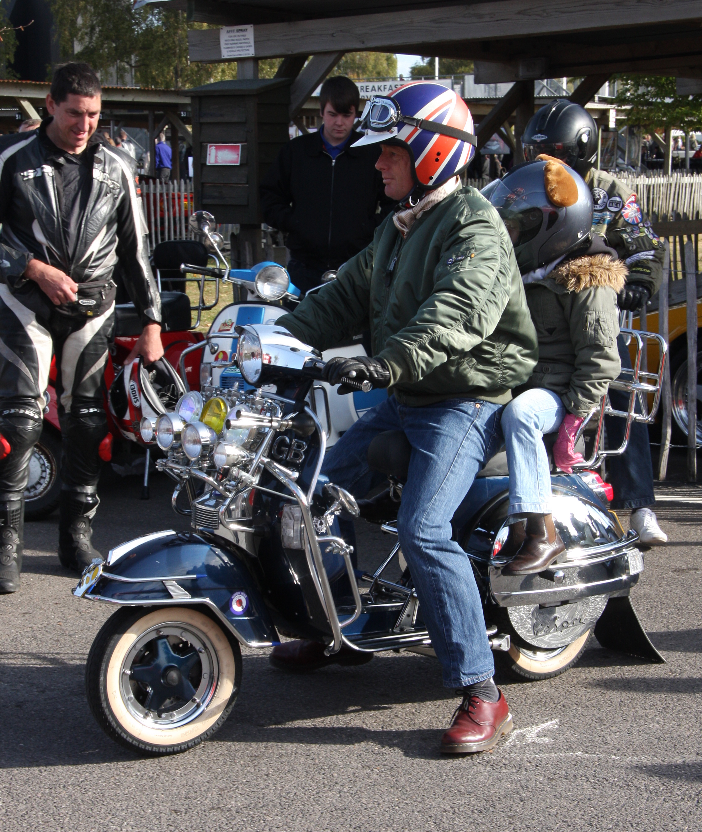 Vespa